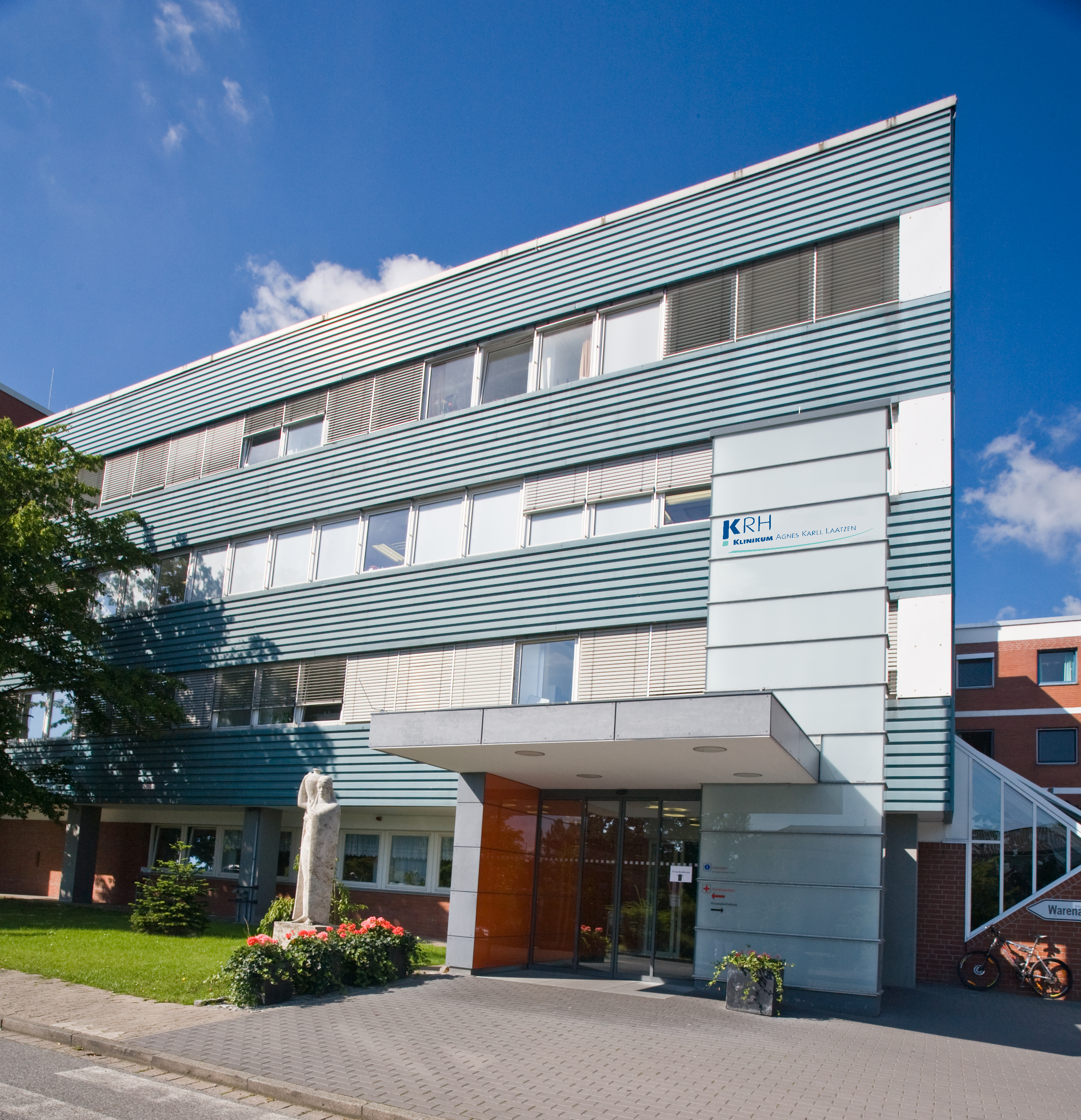 Dargestellt ist das Hauptgebäude